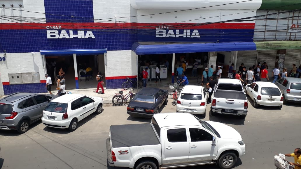 Centro Comercial de Cruz das Almas